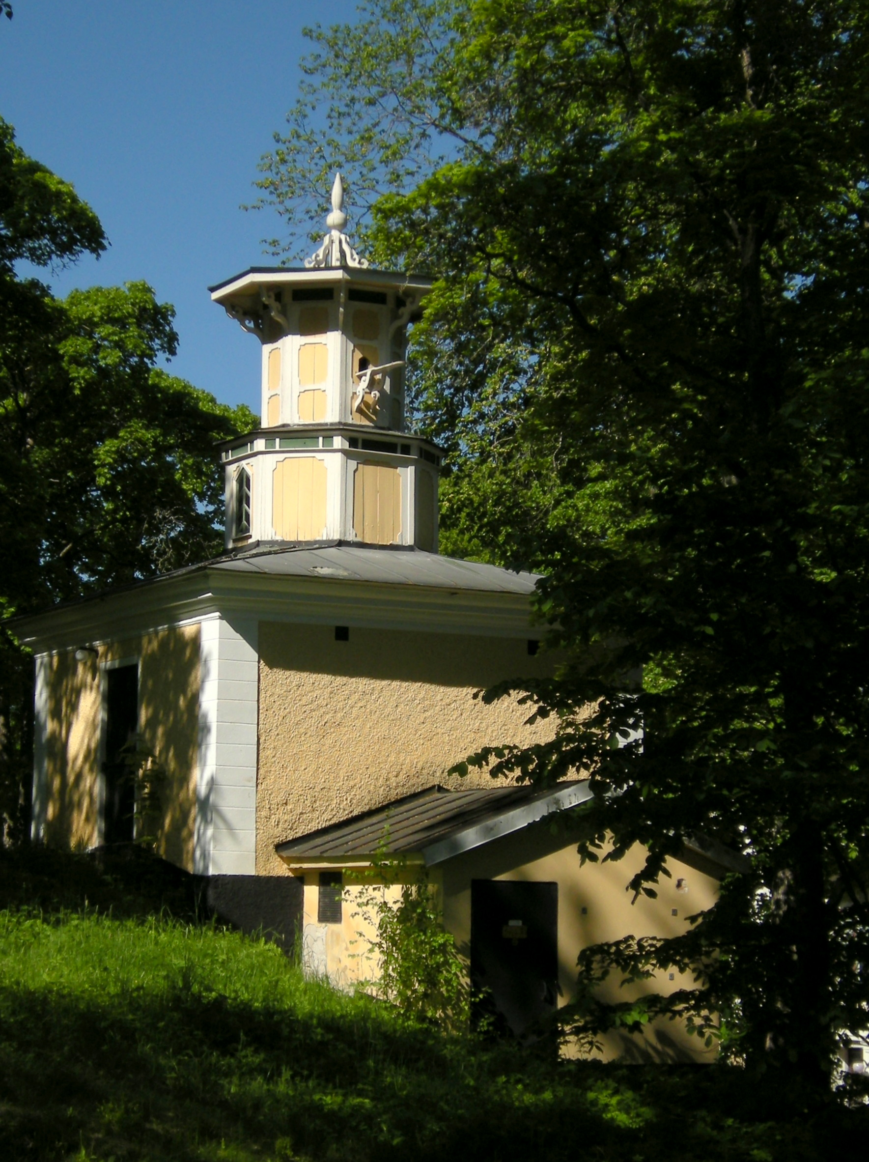 Musiktempel Gamla duvslaget vid Hammarby bruk (correction based on information from Wikipedia:Anmäl ett fel February 15, 2011).